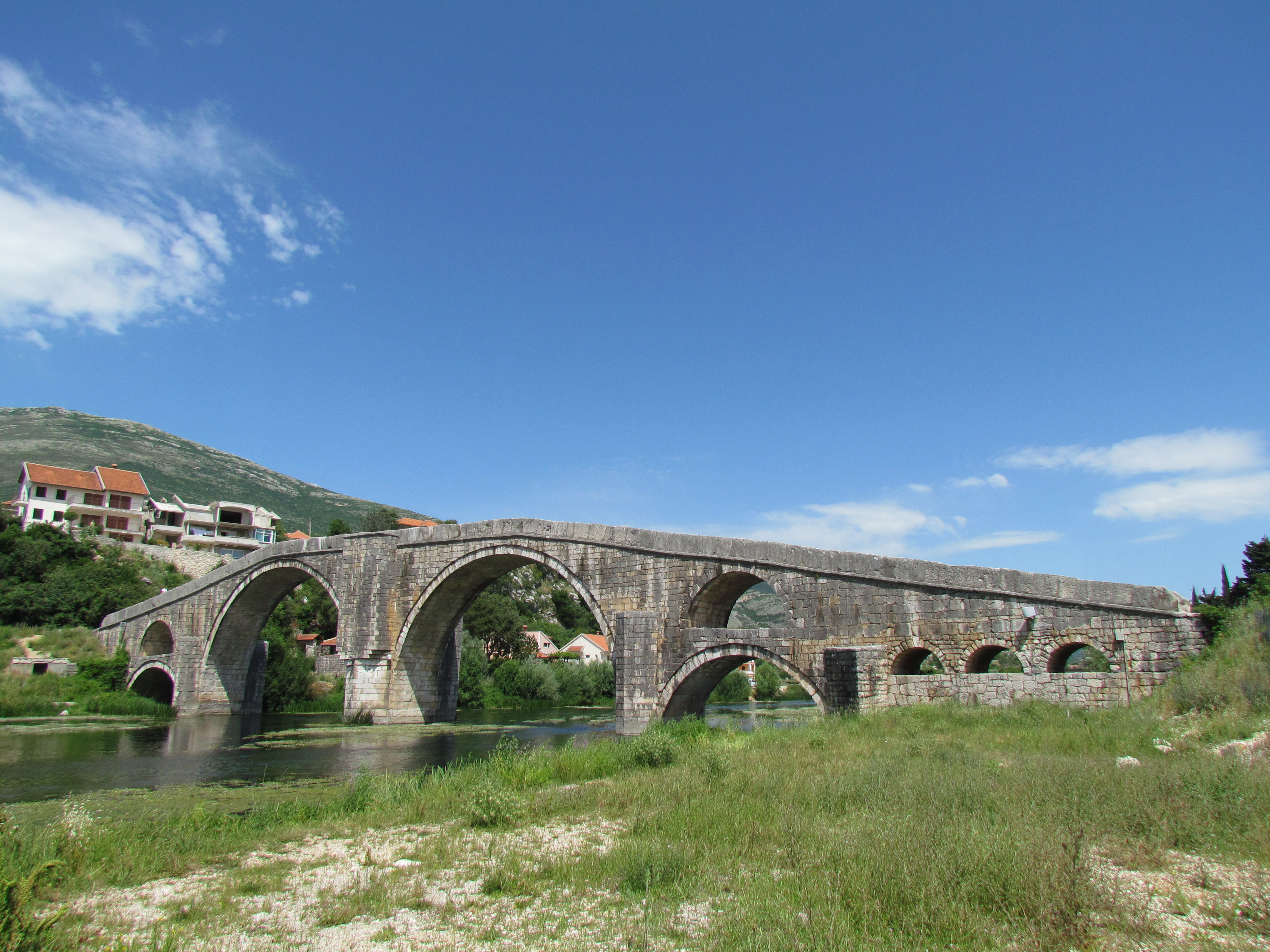 Arslanagića most na reki Trebišnjici je kot nadarbino za svojega sina, padlega v spopadu z Benečani, leta 1574 zgradil Mehmed Paša Sokolović kakšnih pet kilometrov vzhodno od Trebinja. Z izgradnjo hidroenergetskega sistema ga je poplavilo akumulacijsko jezero. Leta 1966 so ga med praznjenjem jezera razstavili in ponovno postavili v predmestju Trebinja.